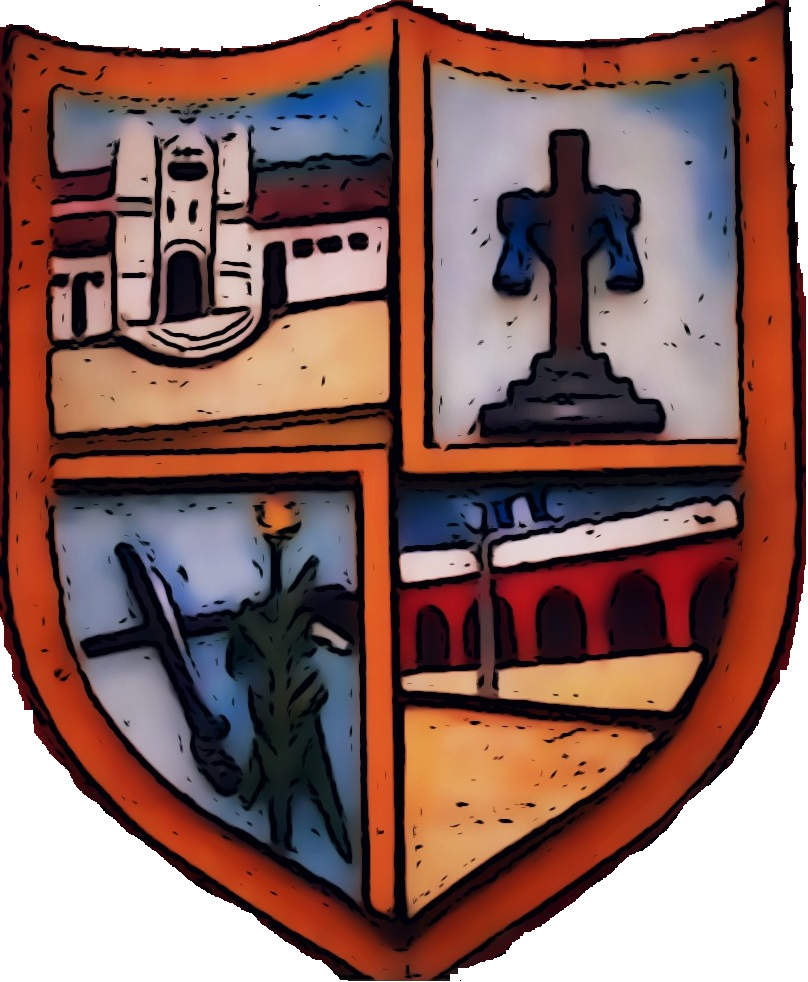 Escudo municipal de Santa Cruz Verapaz